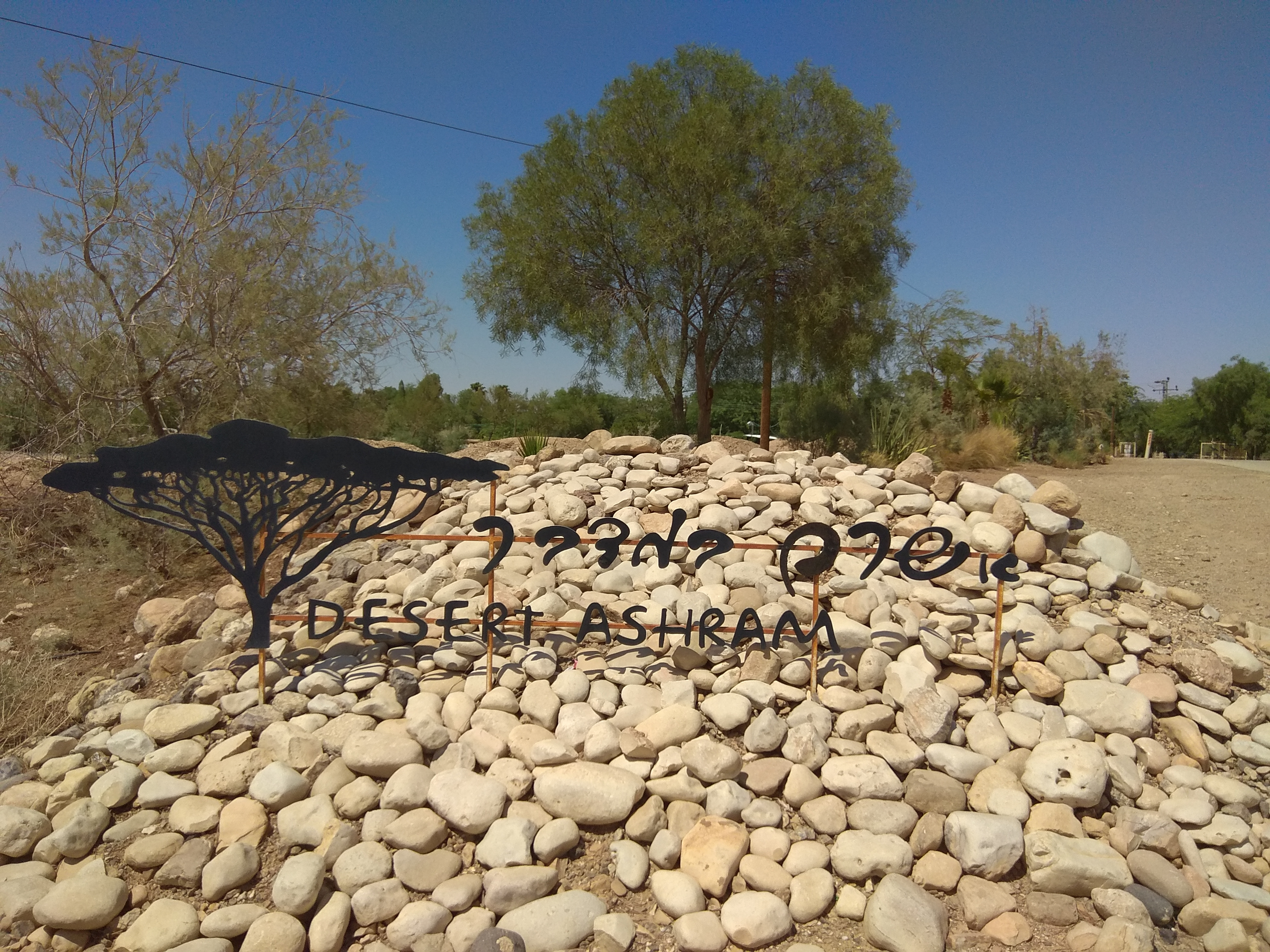 שלט בכניסה לאשרם במדבר